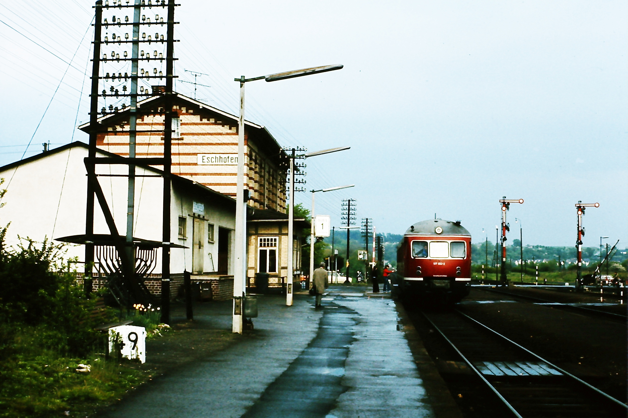 Bahnhof Eschhofen mit 517 002